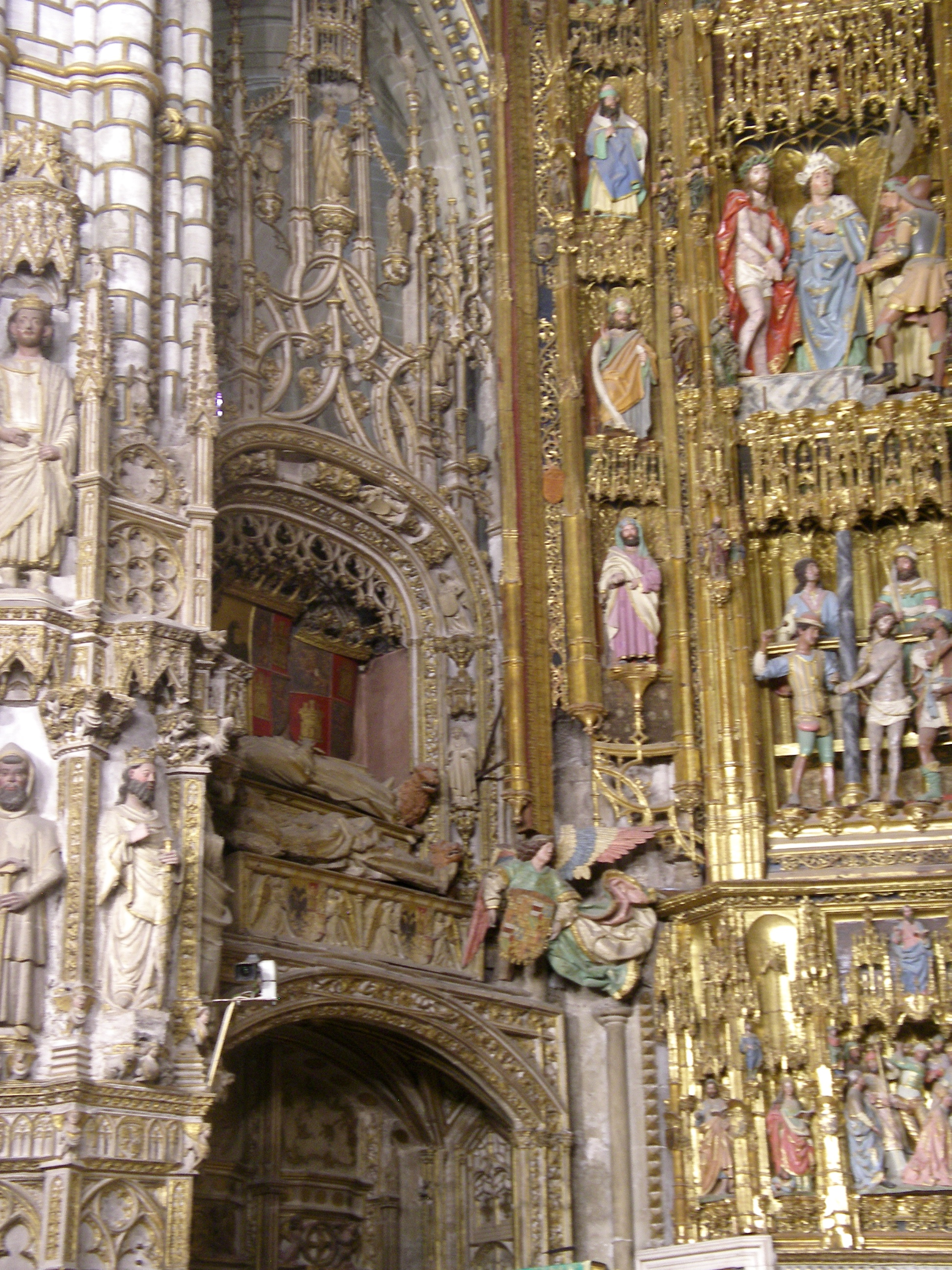 Sepulcros del rey Alfonso VII de León y de Pedro de Aguilar en la capilla mayor de la catedral de Toledo.